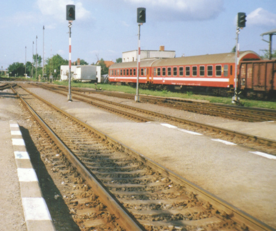 Reloj, kuŝnataj sur ferbetonaj reltraboj, kaj apudurbaj senmotoraj vagonoj (du, dekstre) en stacio Prievidza, Slovakio, 2002. Mi, aŭtoro de la bildo, permesas al ĉiuj uzi ĝin kun ĉi tiuj kondiĉoj: La fonta bildo de ĉi tiu bildo estas ankaŭ en mia propra retpaĝaro [1]